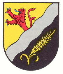 Wappen der Gemeinde Breitenbach (Pfalz)